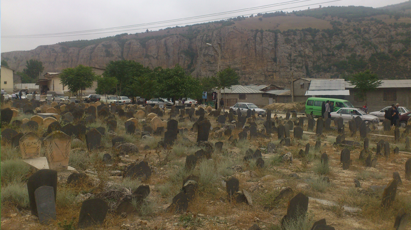 سه‌شنبه ۱۳۹۳/۰۵/۰۷ فطر ۱۴۳۵